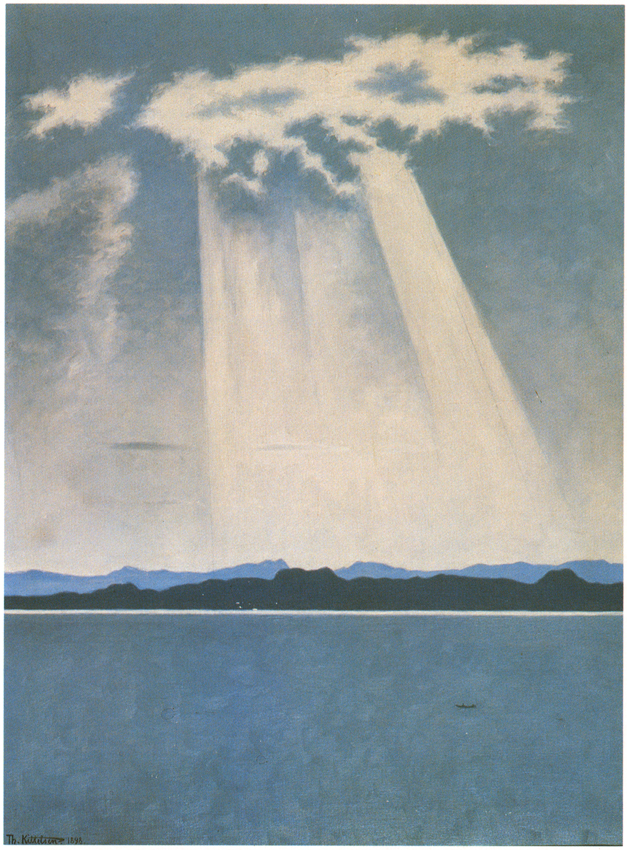 Norge, Norge